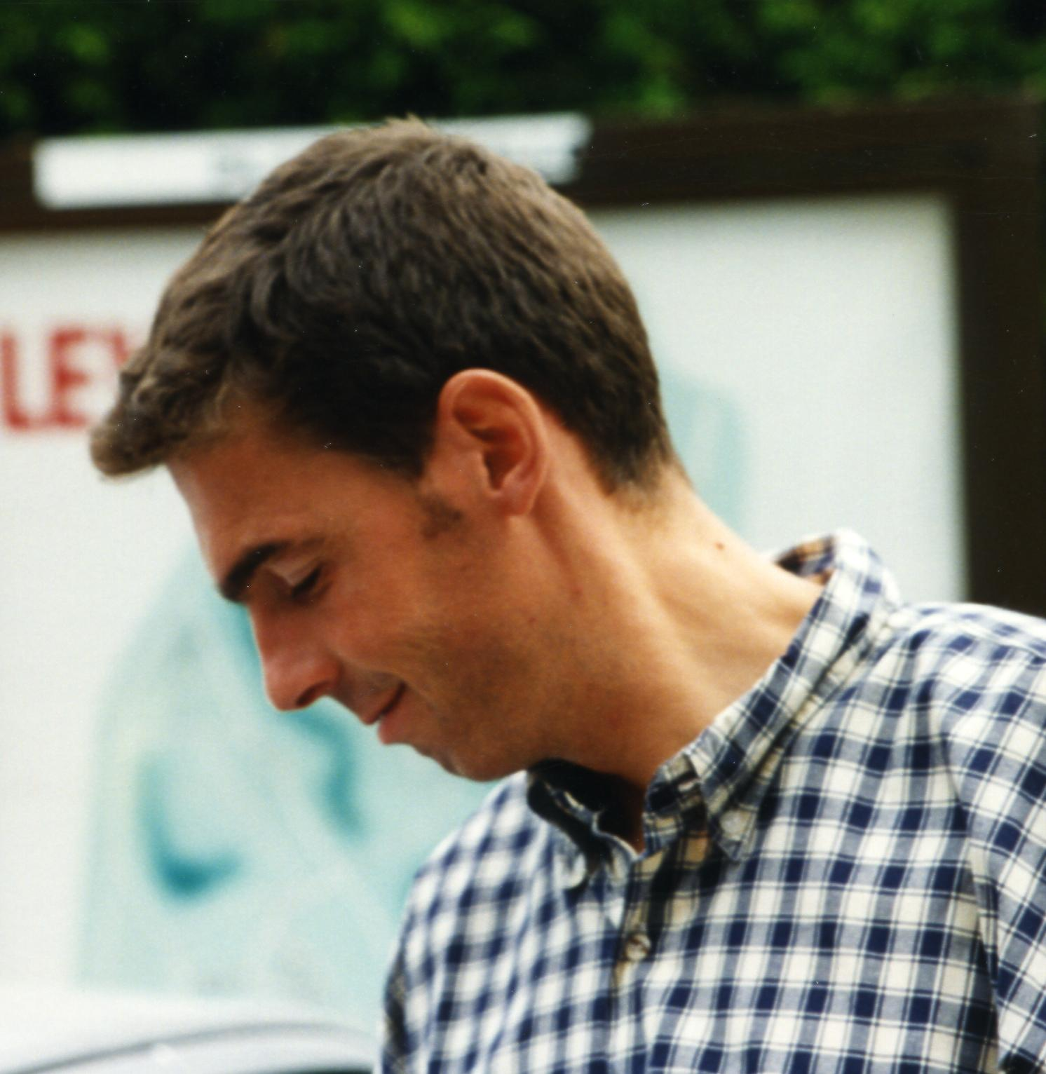 CRITERIUM DE LEVES